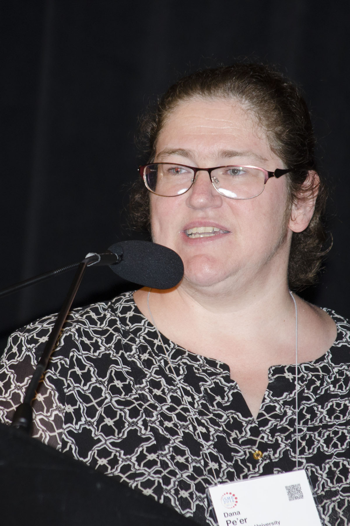 2014 ISCB Overton Prize-winner Dana Pe'er